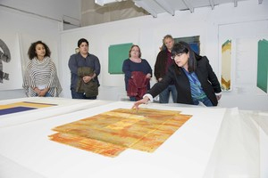 Graham Hebel